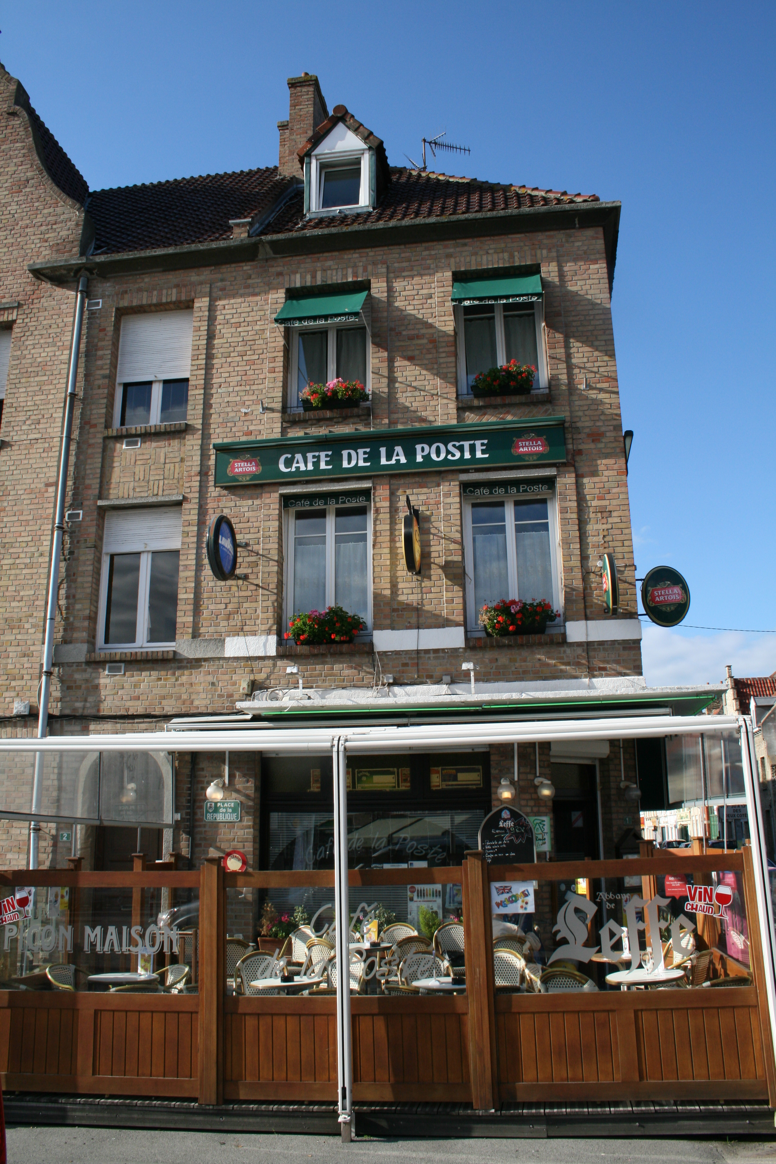 Le café de la Poste, 1 place de la République à Bergues (département du Nord, France).